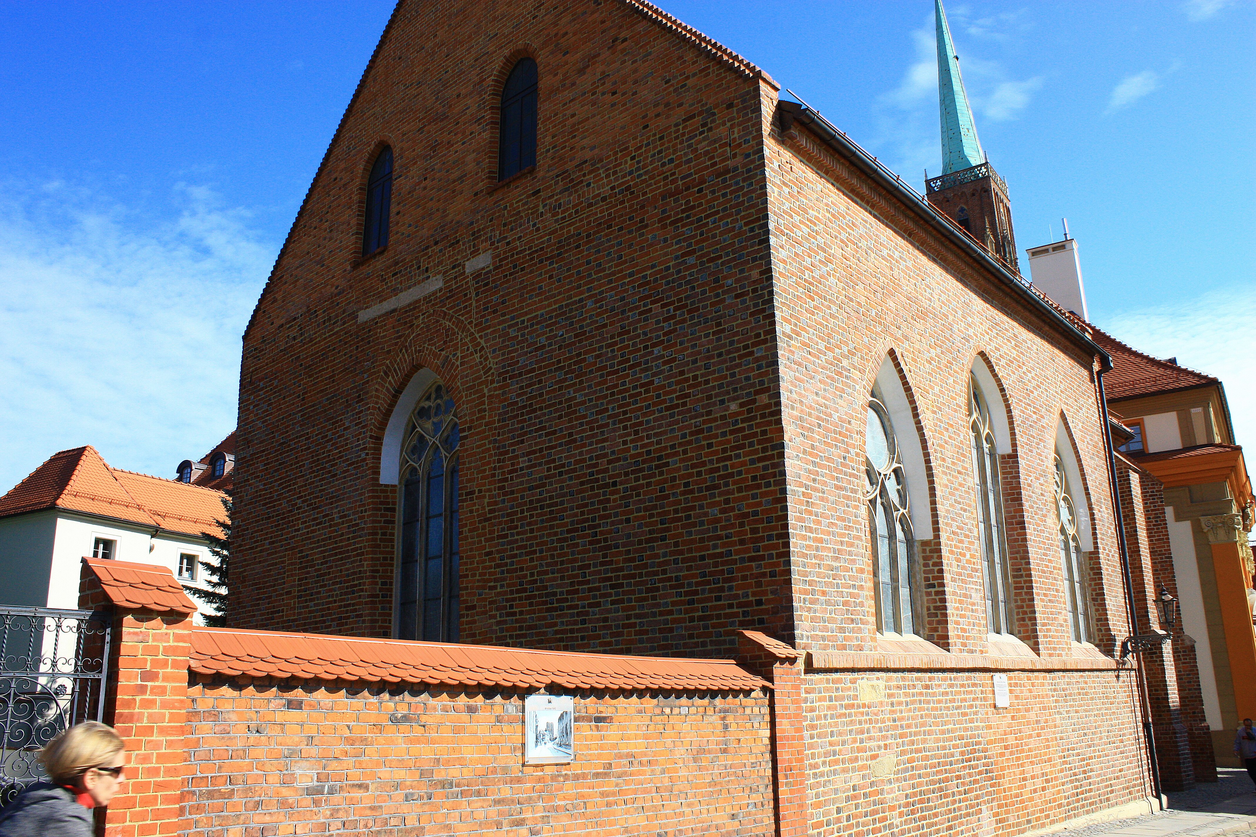 Wrocław, kościół p.w. śś. Piotra i Pawła, XV, XX